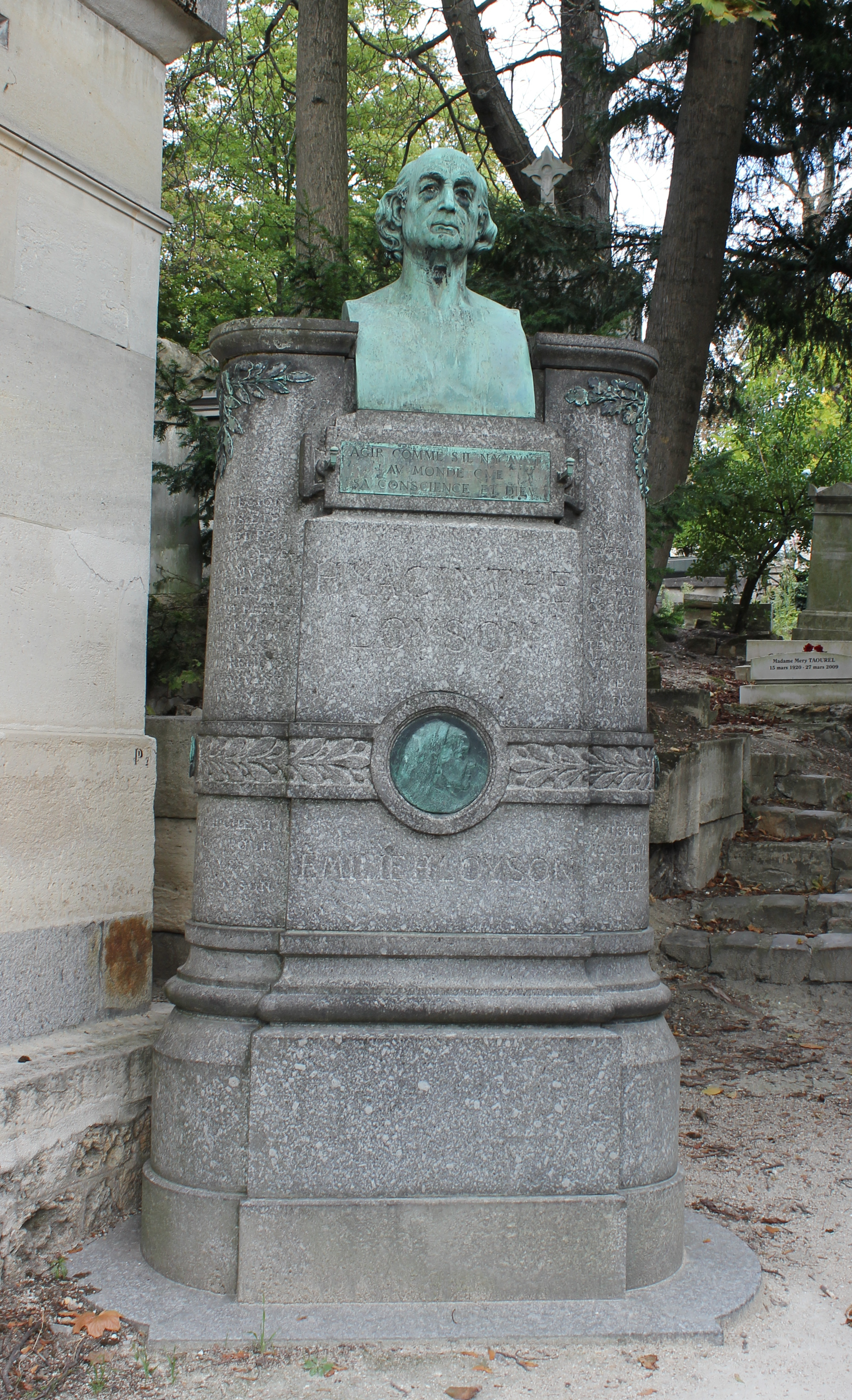 Tombe du Père Hyacinthe et de son épouse Emilie-Hyacinthe Loysonvue générale, face avant